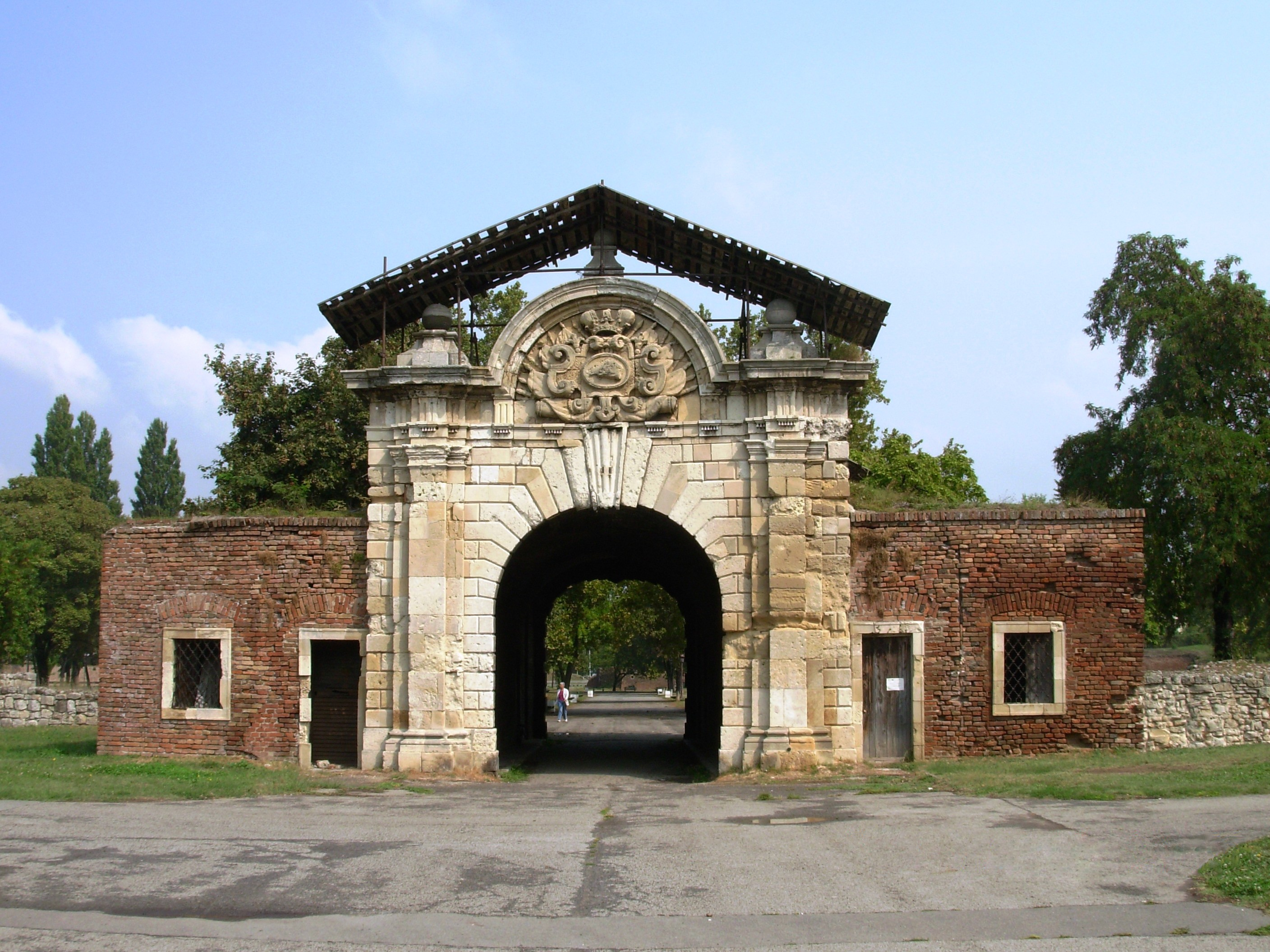 Остаци капије Карла VI на доњем Калемегдану.